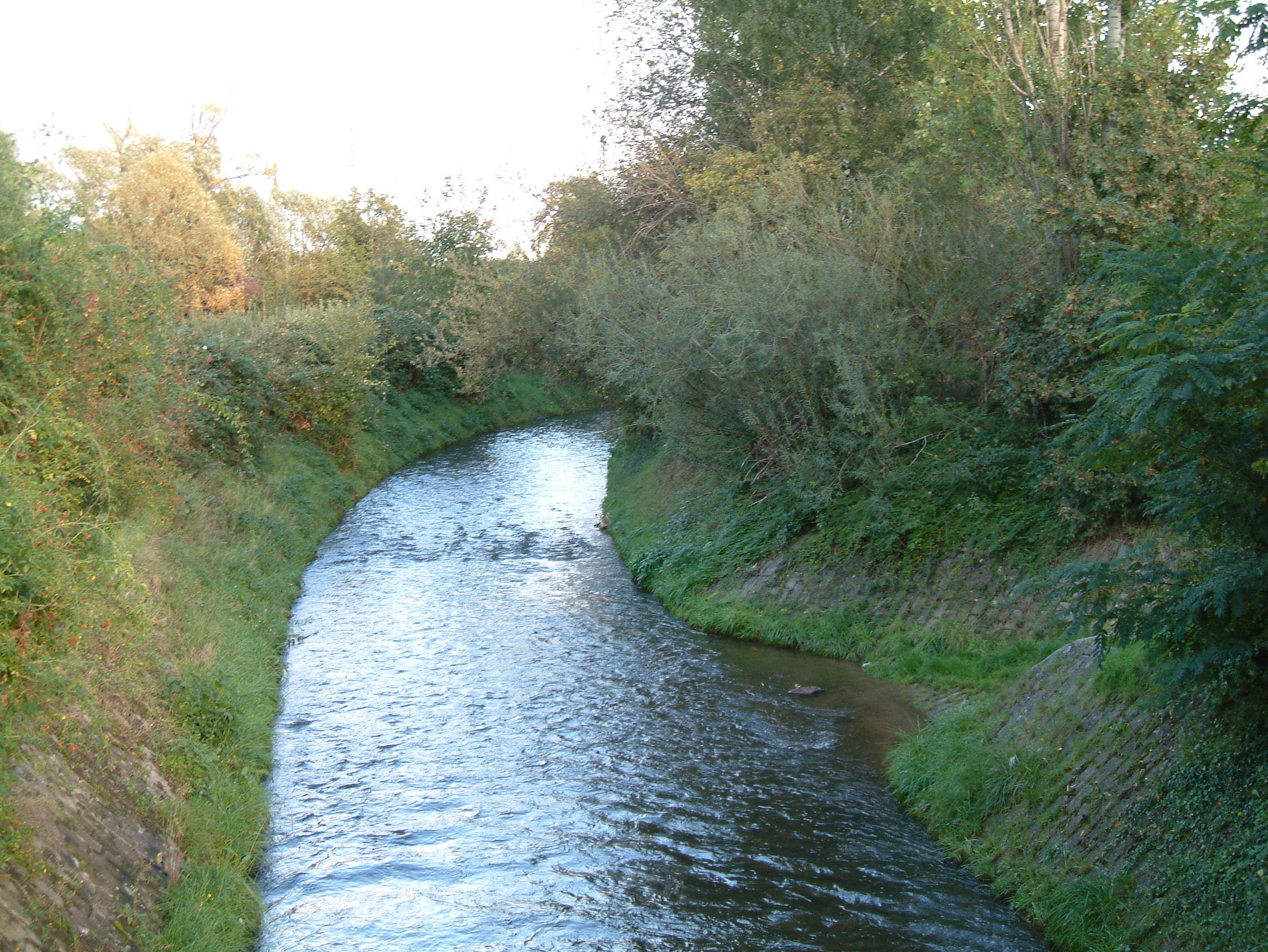 Rehbach in Neustadt an der Weinstraße, selbst fotografiert am 2006-10-07 und freigegeben durch Benutzer:Mundartpoet